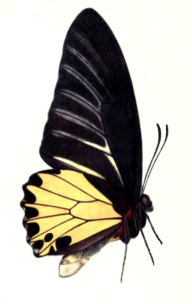 Troides helena var. cerebrus = Troides helena cerberus (C. & R.Felder, 1865)